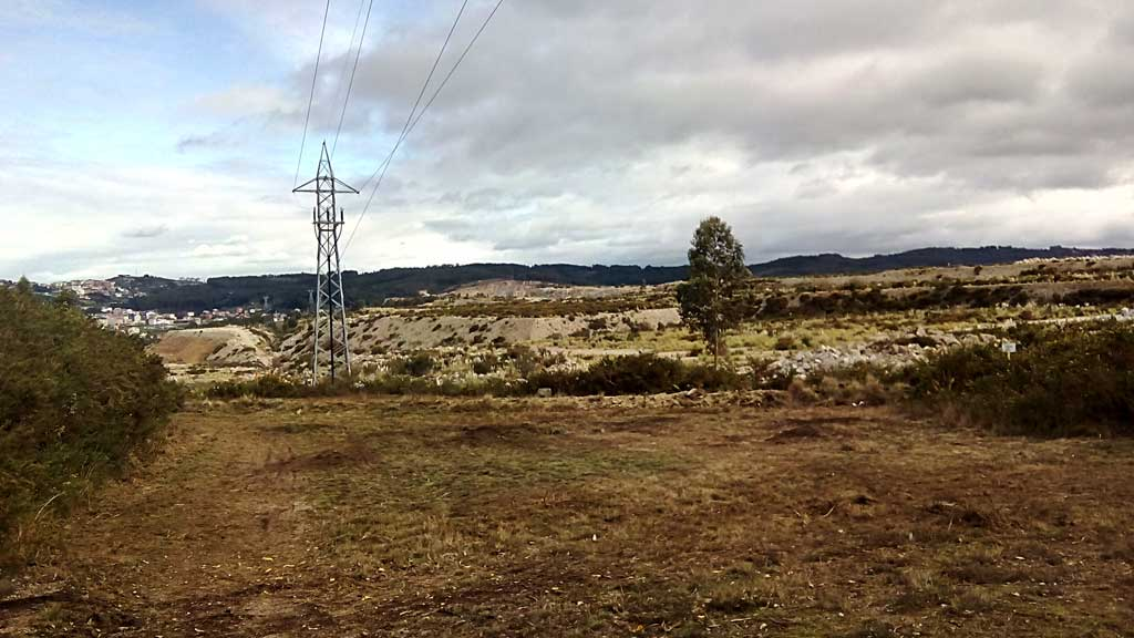 Vista do polígono de Morás en 2018.